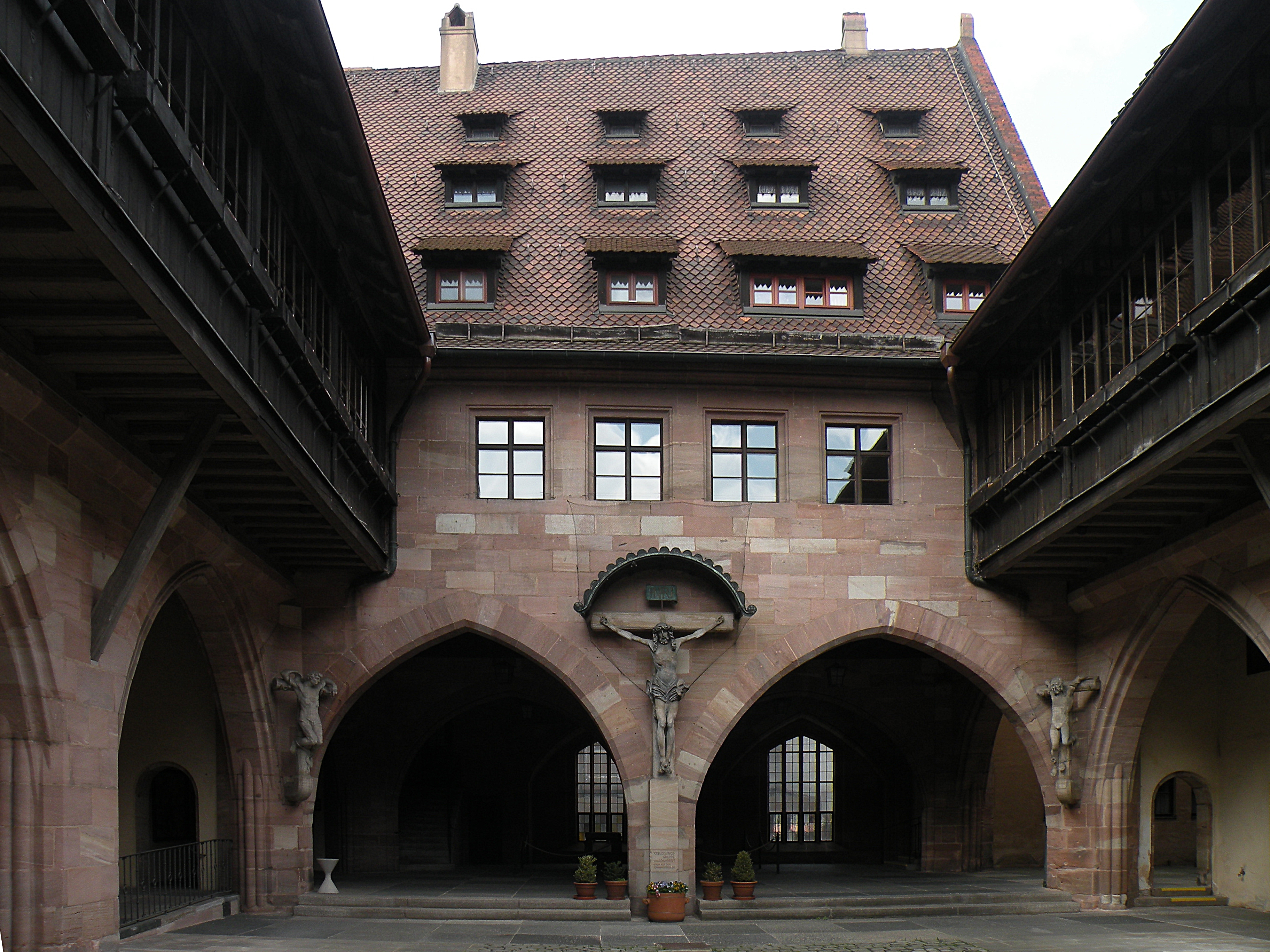 Адам_Крафт._Распятия во дворе госпиталя Св.Духа